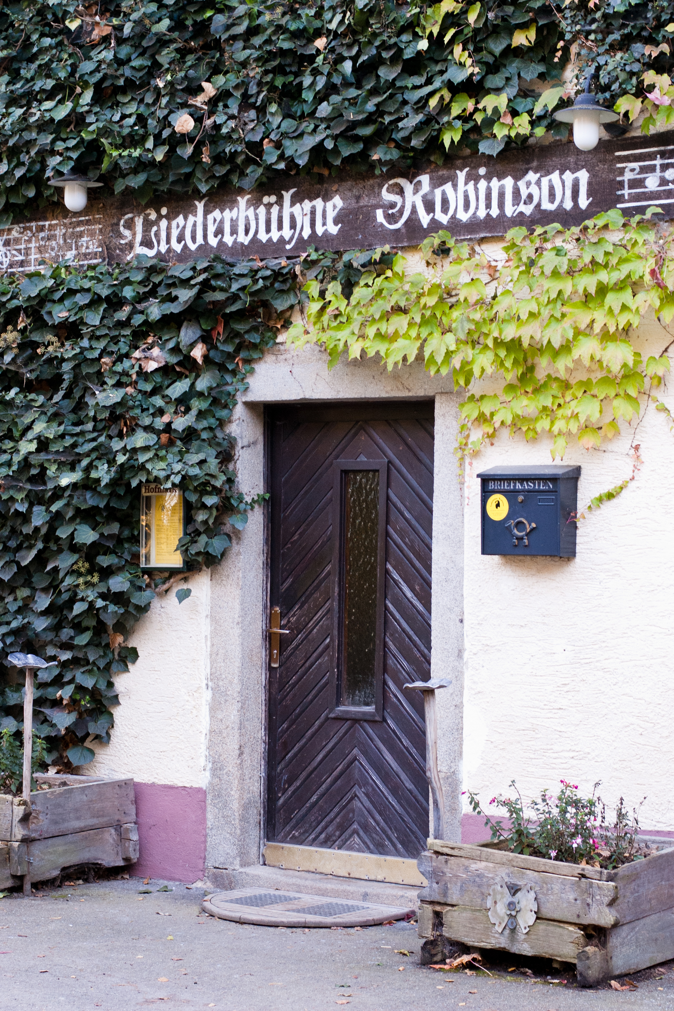 Foto